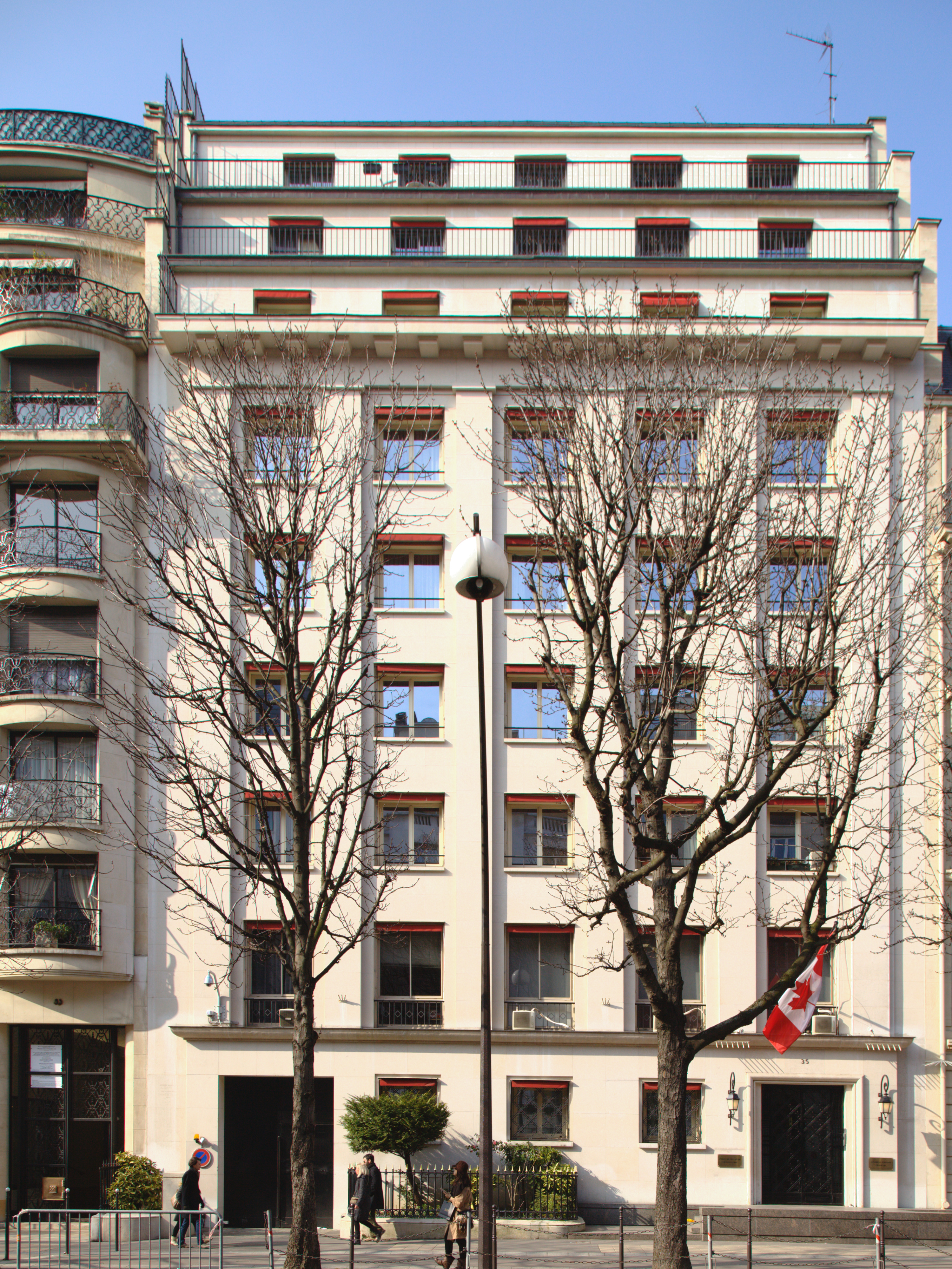 L'ambassade du Canada à Paris, au numéro 35, avenue de Montaigne